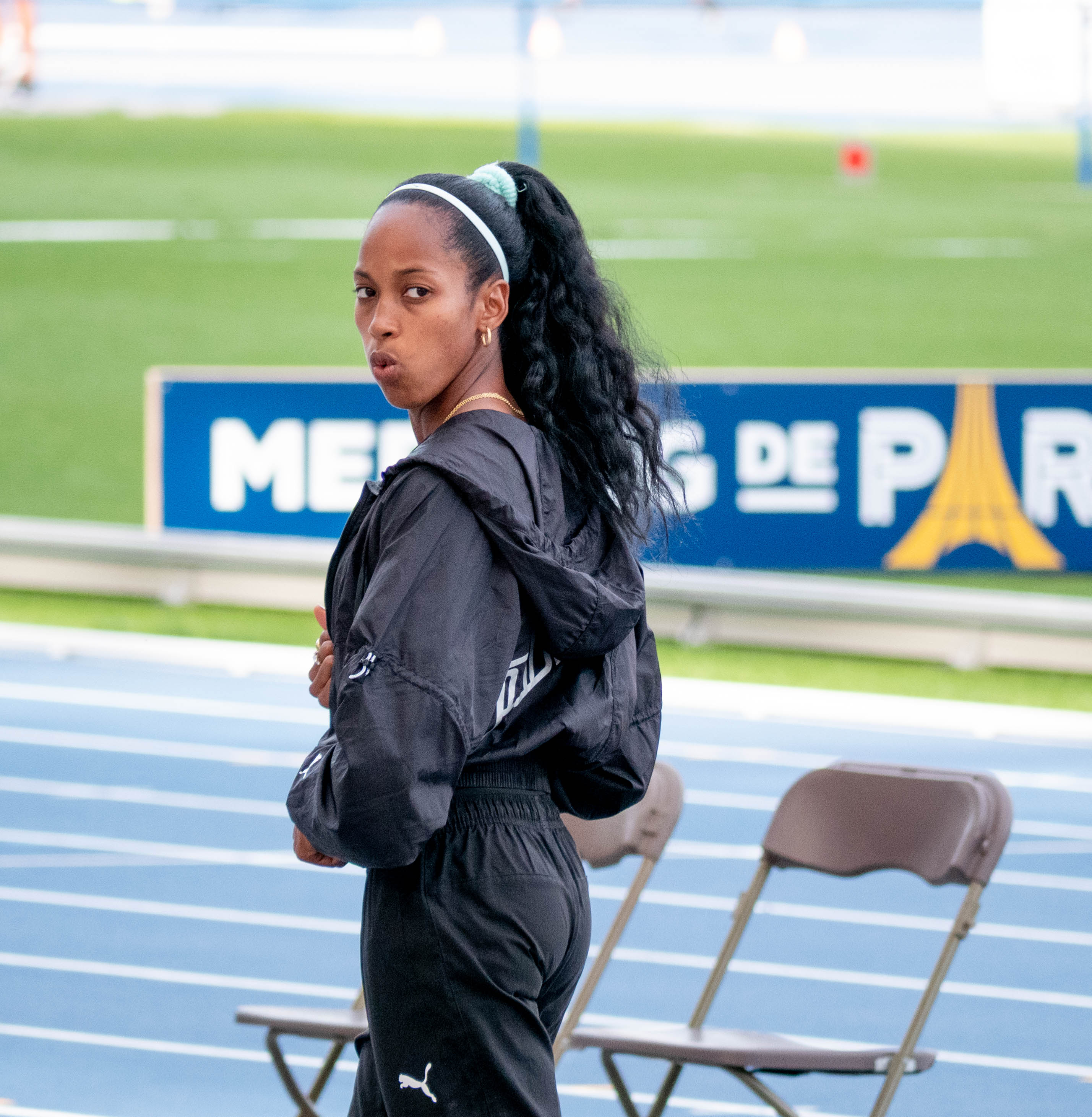 Meeting de Paris 2019 - Compétition d'athlétisme au stade Charlety - 24 août 2019